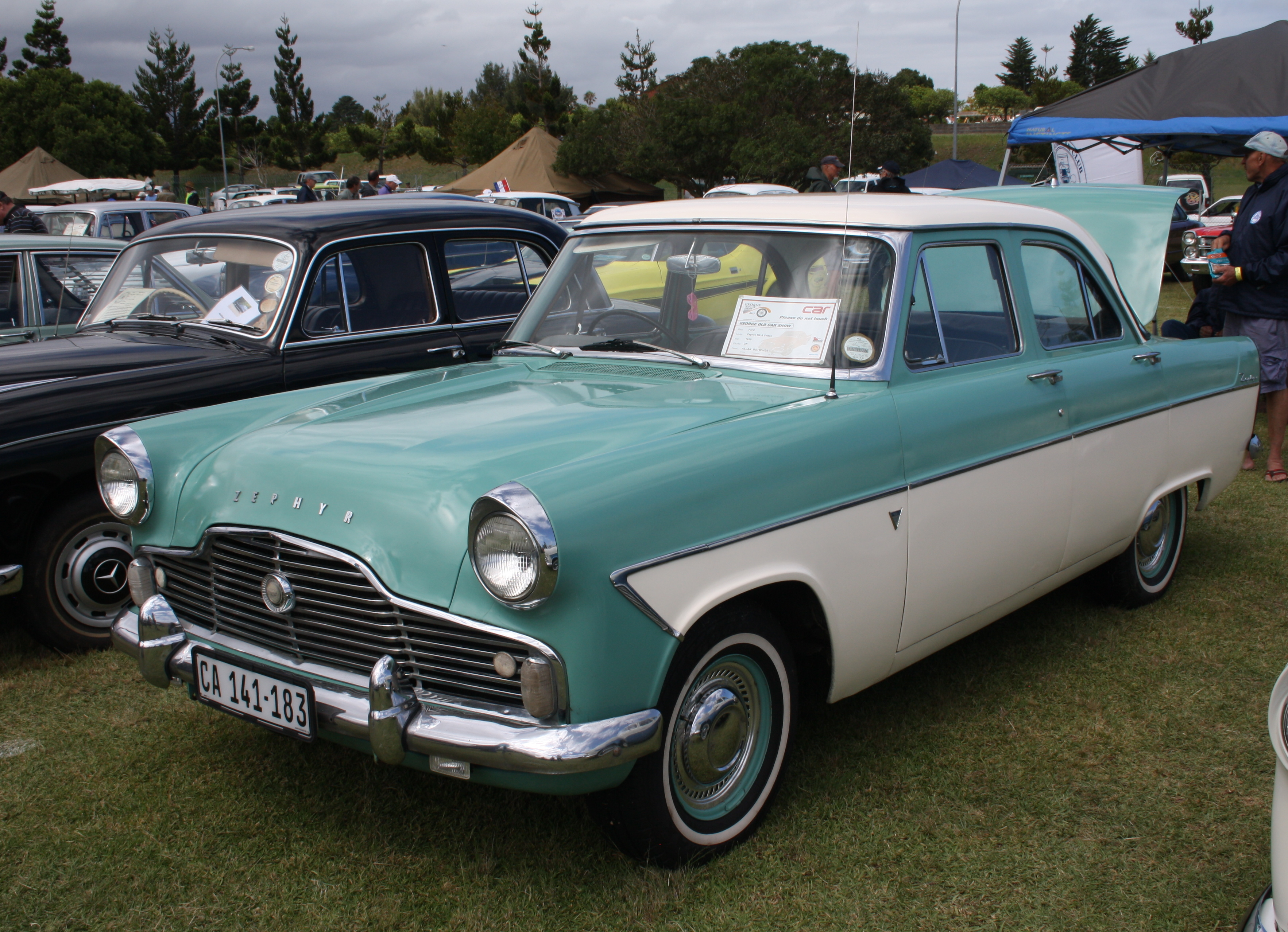 1959 Ford Zephyr MKII